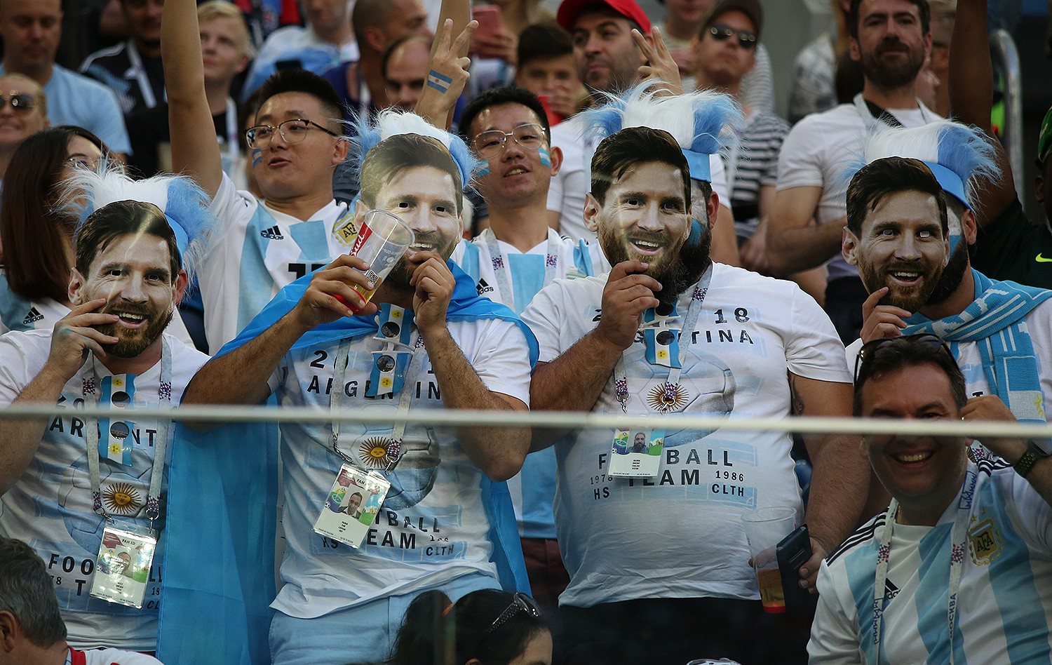 Гол Рохо в концовке выводит Аргентину в плей-офф чемпионата мира